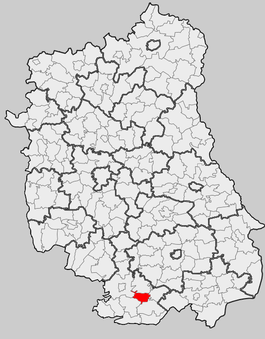 Map of gmina Aleksandrów, Biłgoraj county, Lublin voivodship Mapa gminy Aleksandrów, powiat biłgorajski, województwo lubelskie